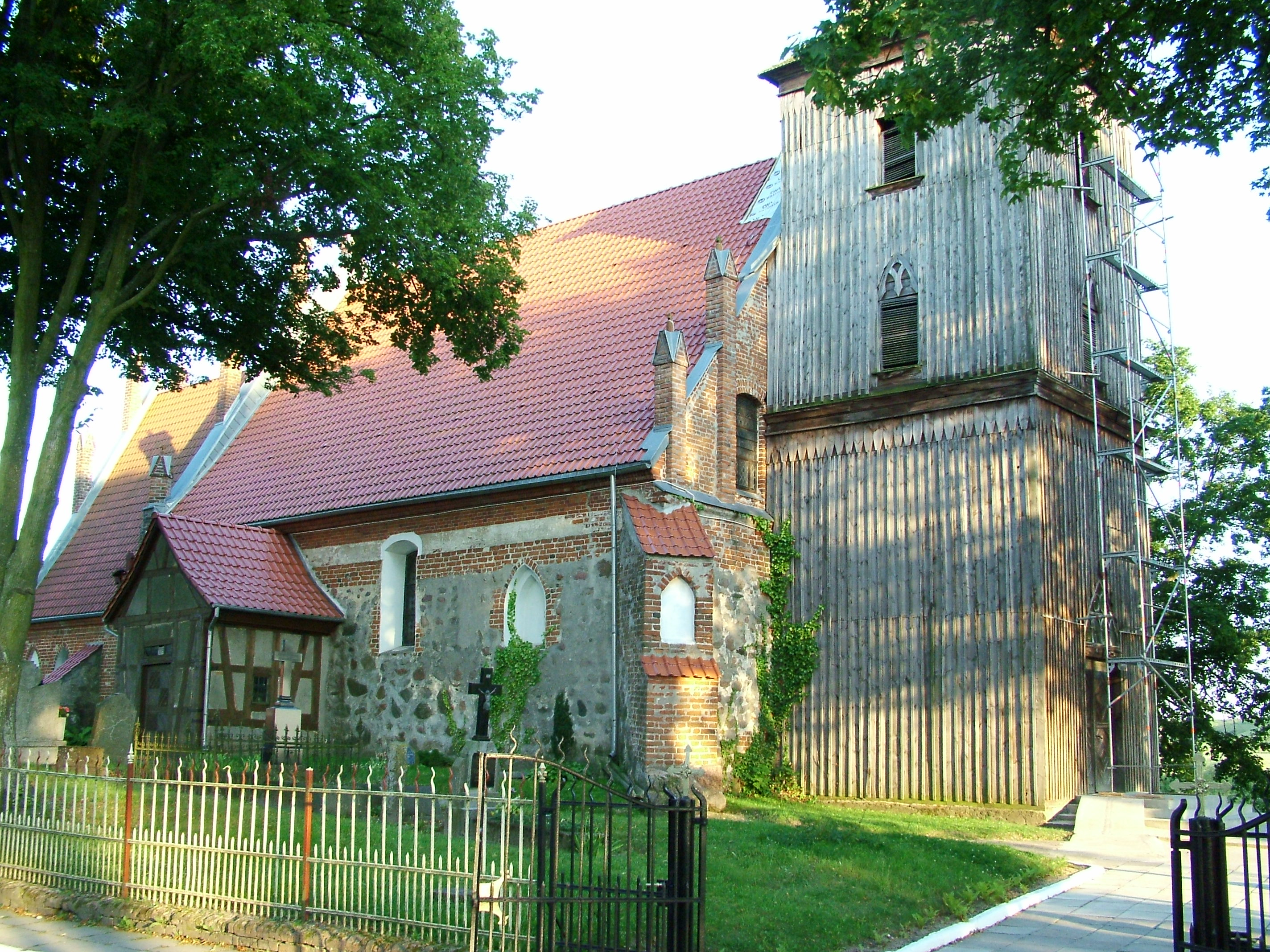 Kalwa - rzymskokatolicki kościół parafialny p.w. św. Marii Magdaleny, 1286, 1310, 1402 (wieża drewn. - 1821)